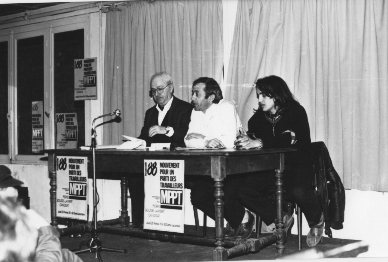 meeting Pierre Boussel Lambert, MPPT, février 1988 Montpellier + AC